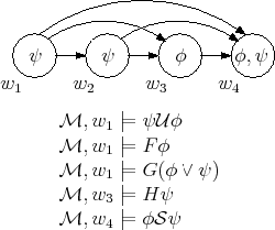 LTL model example